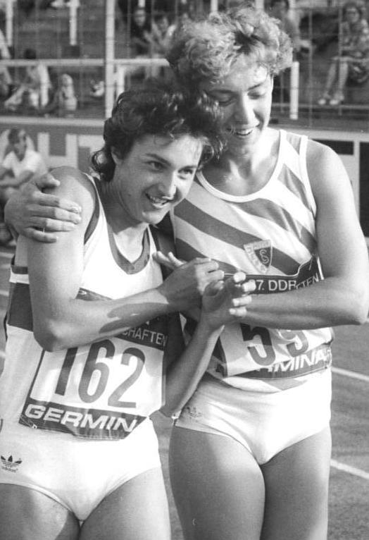 Silke Gladisch, Sabine Rieger ADN-ZB Kluge 27.6.86 Bez. Gera: 37. DDR-Meisterschaften der Leichtathleten in Jena - DDR-Meisterin im 100-m-Lauf wurde auf dem Ernst-Abbe-Sportfeld Silke Gladisch (SC Empor Rostock, l.) in der Jahres-Weltbestzeit von 10,96 s. Gratulation nach dem Erfolg durch die Zweite, Sabine Rieger (SC Motor Jena- 11,31 s).